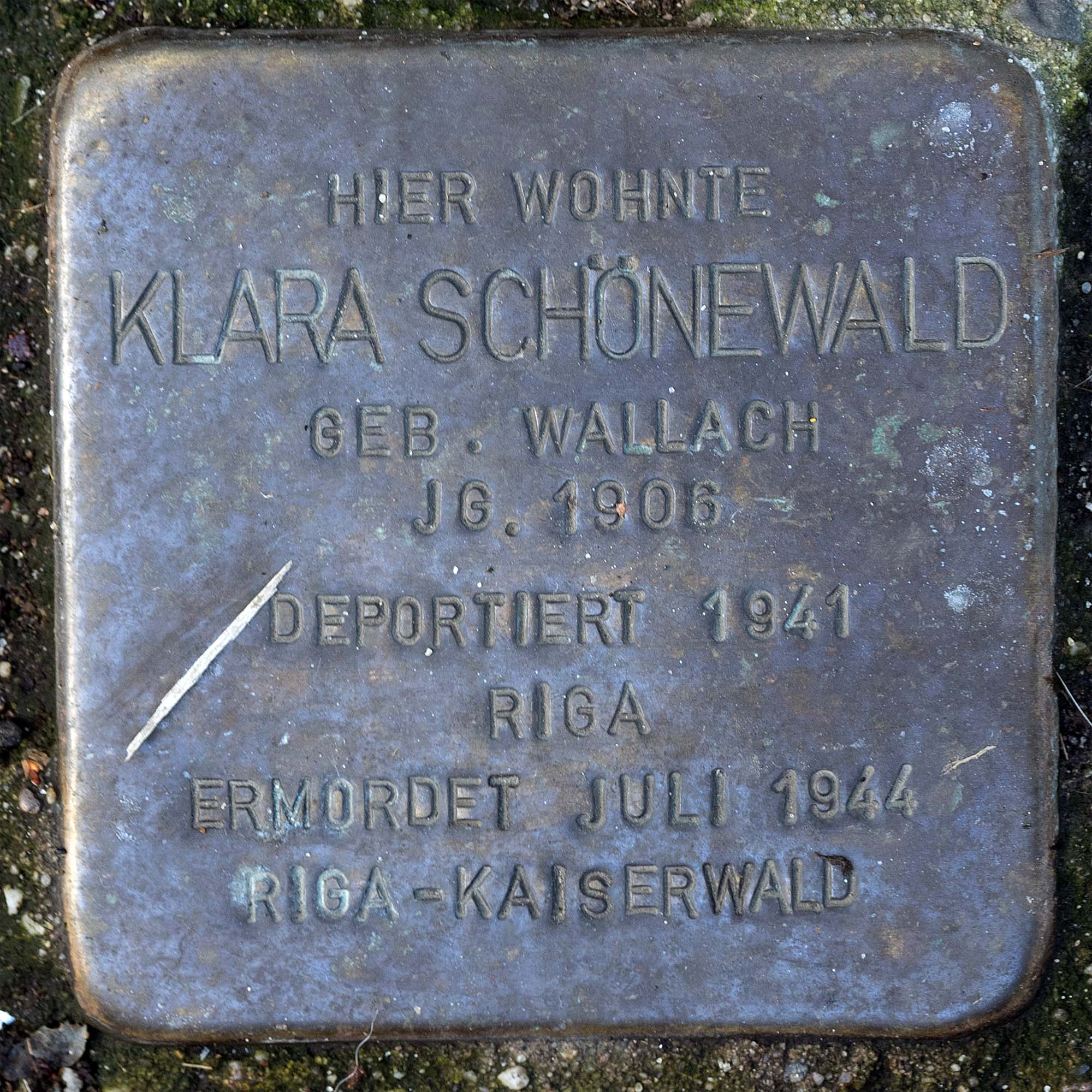 Stolperstein für Schoenewald Klara